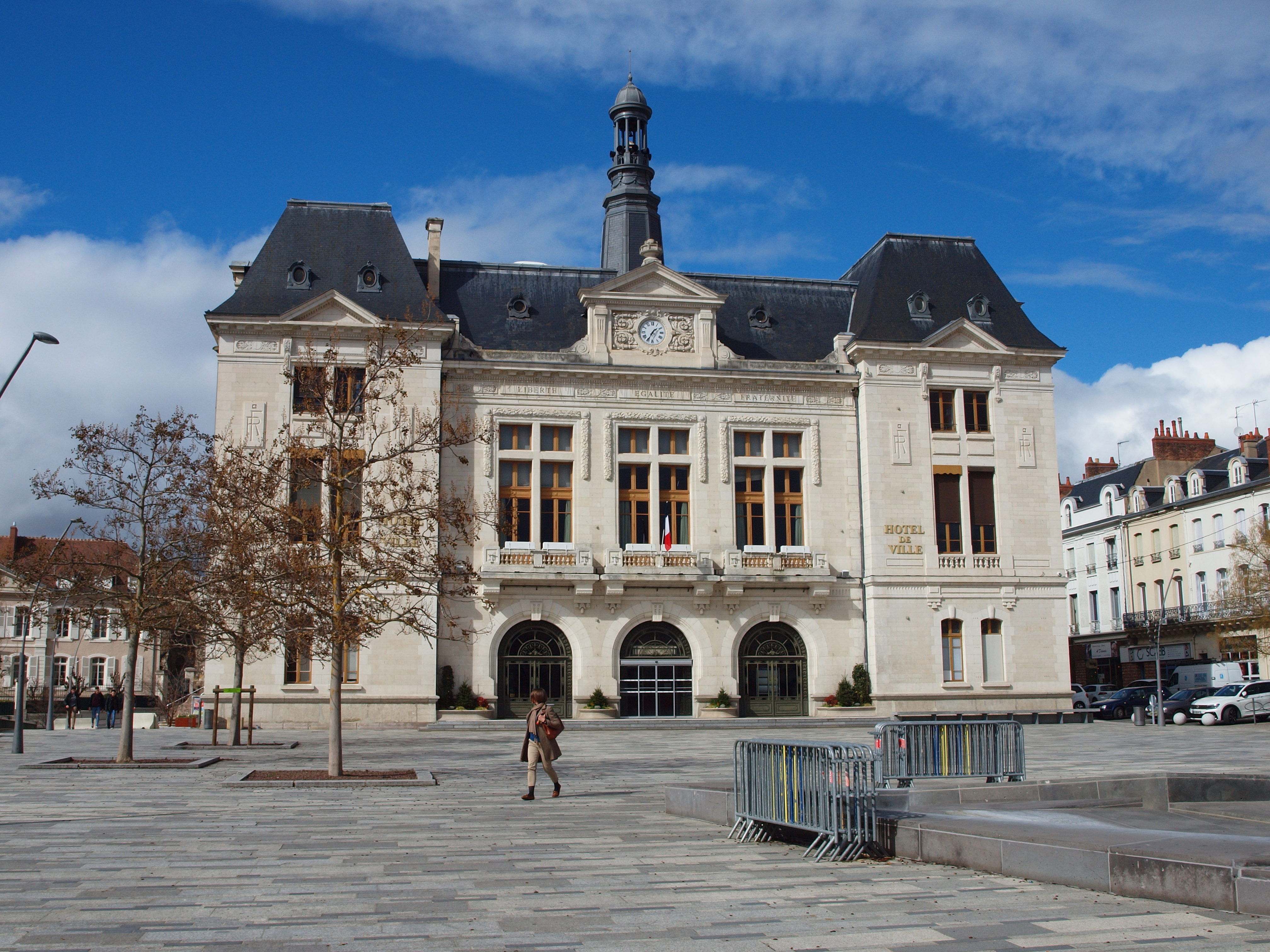 Hôtel de ville de Montluçon (Allier, France)